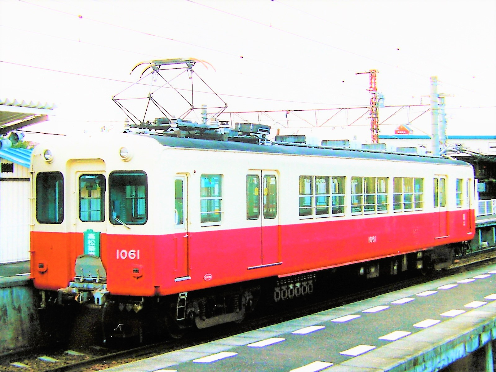 高松琴平電気鉄道1060形電車1061